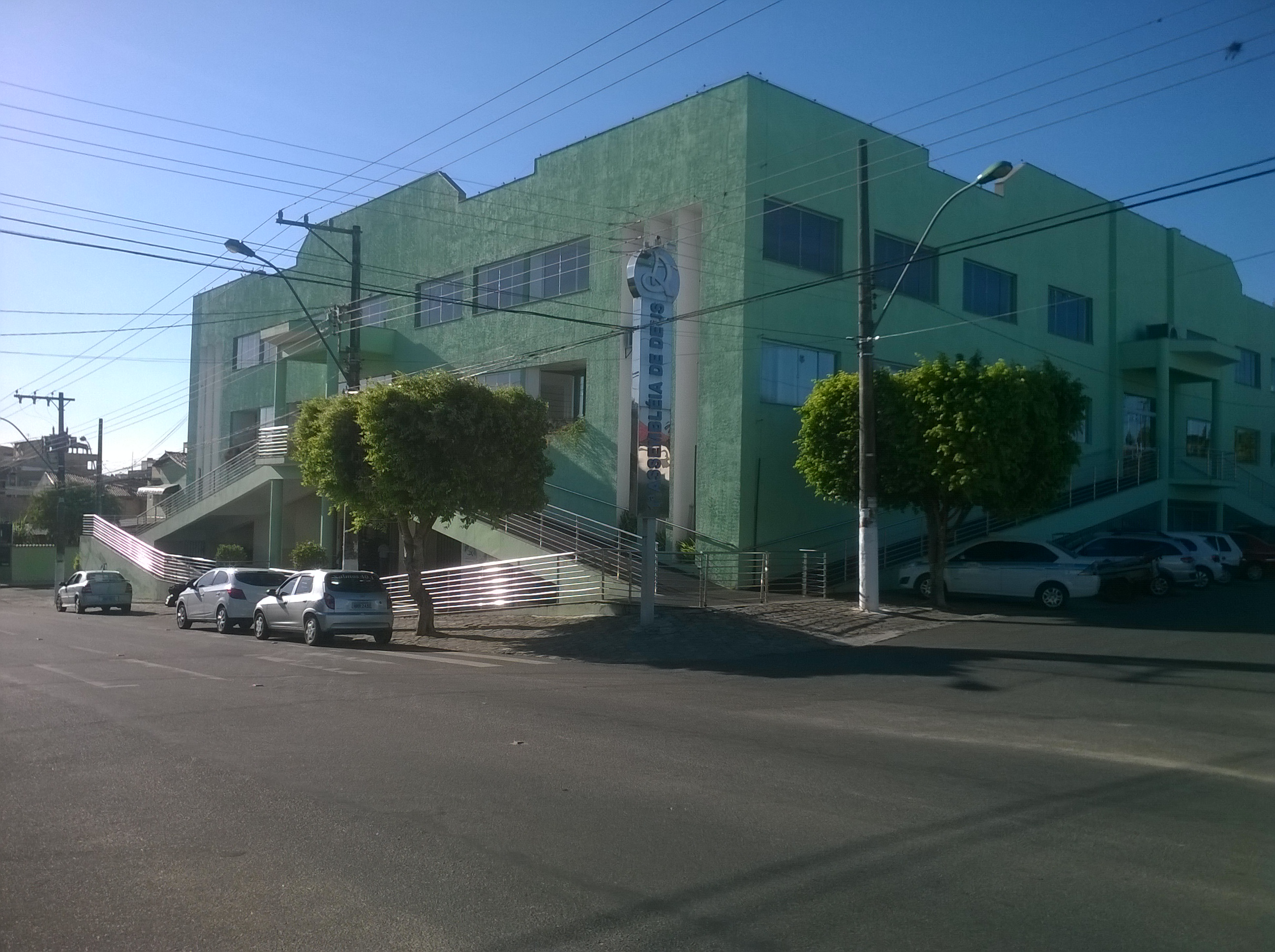 Sede da Assembléia de Deus em São Mateus